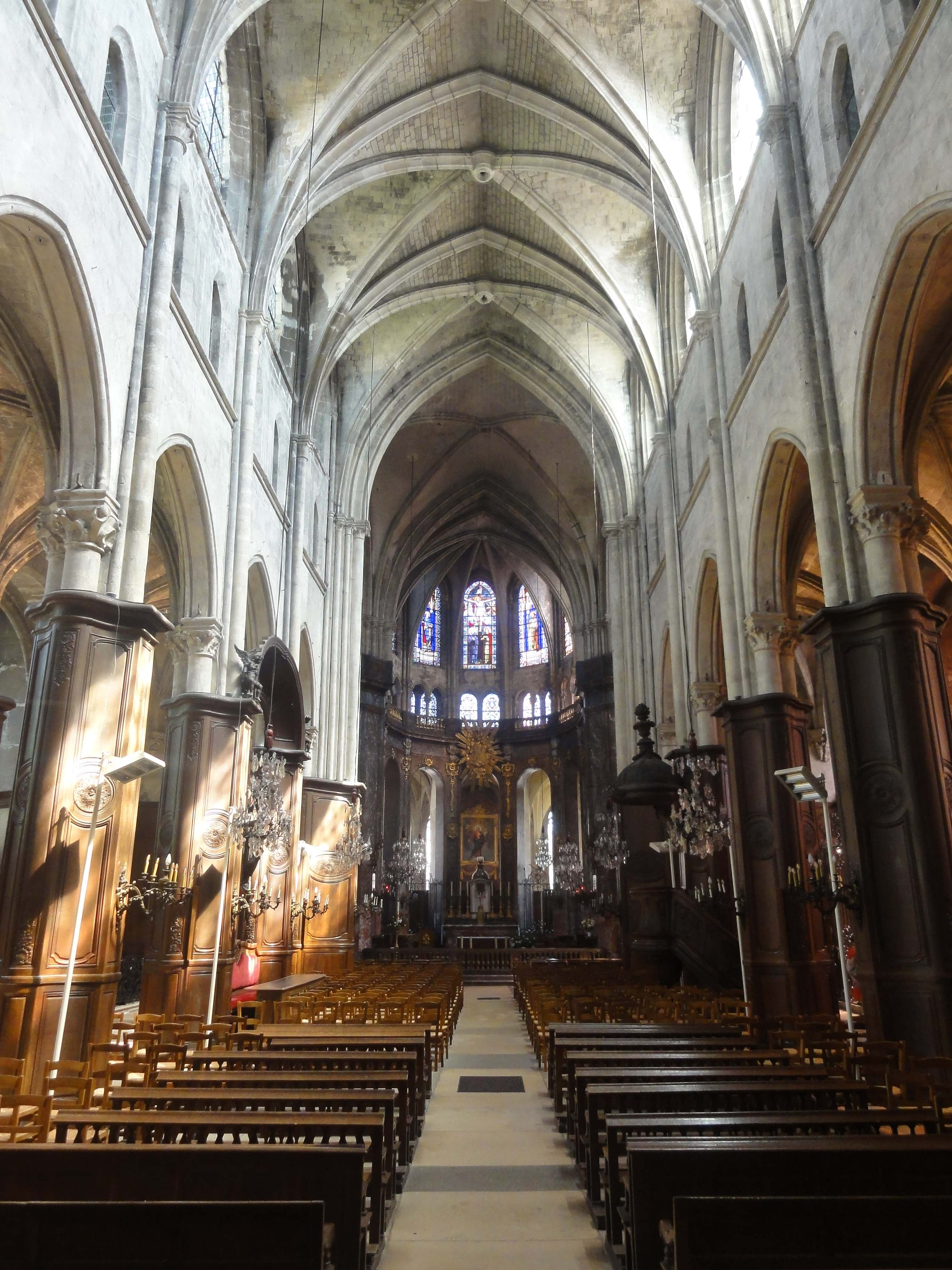 Nef de l'église - voir le titre du fichier.